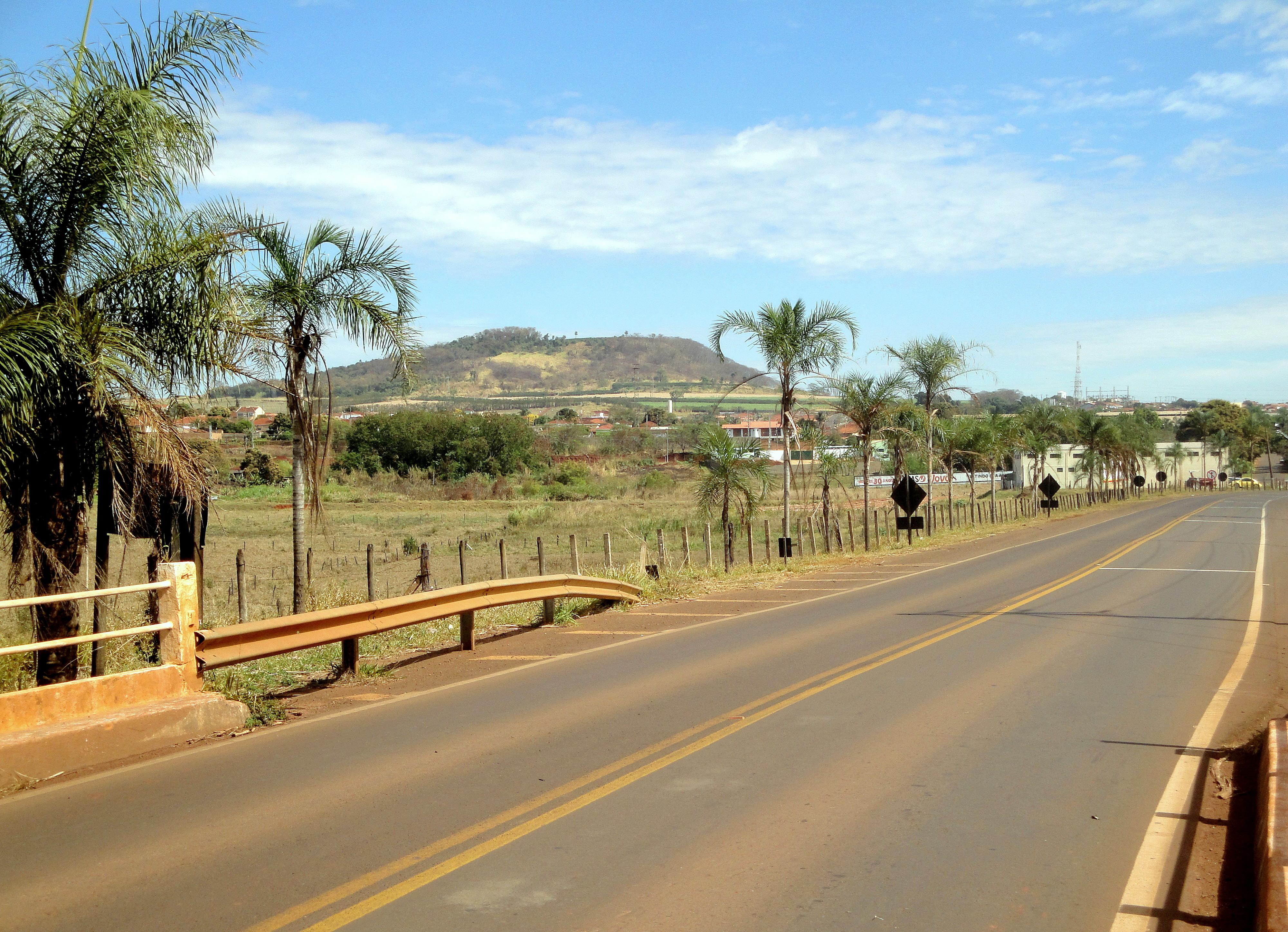 Rodovia Paulo de Arruda Correa da Silva (SP-051), na altura (km 255) da ponte sobre o Ribeirão Rancho Queimado, na entrada da cidade de Rincão, interior de São Paulo, Brasil.